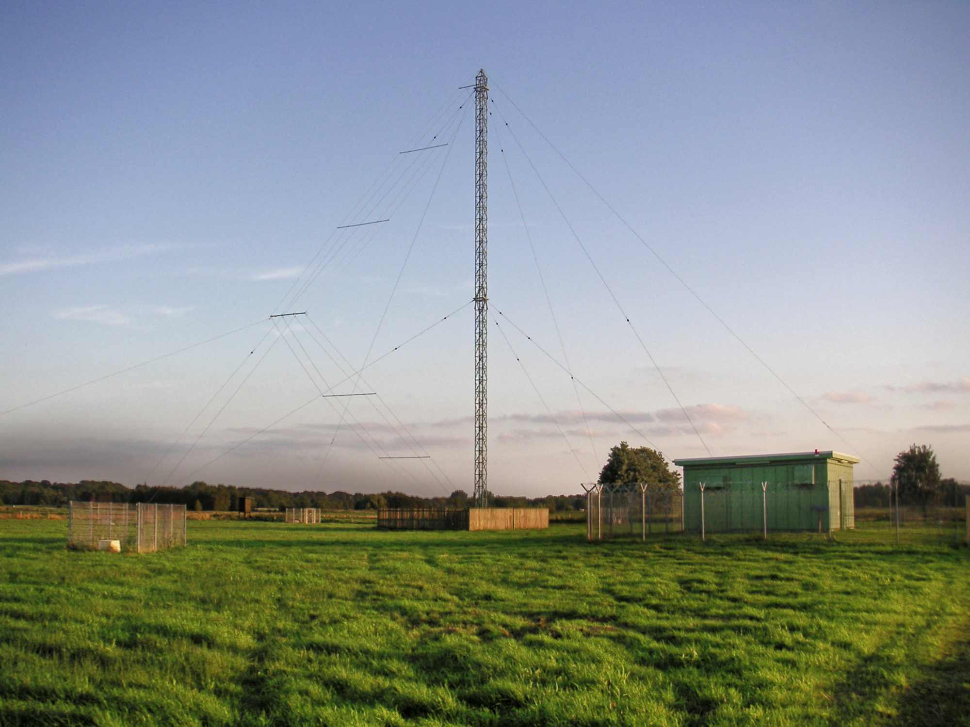 Mittelwellensender Bremen-Oberneuland